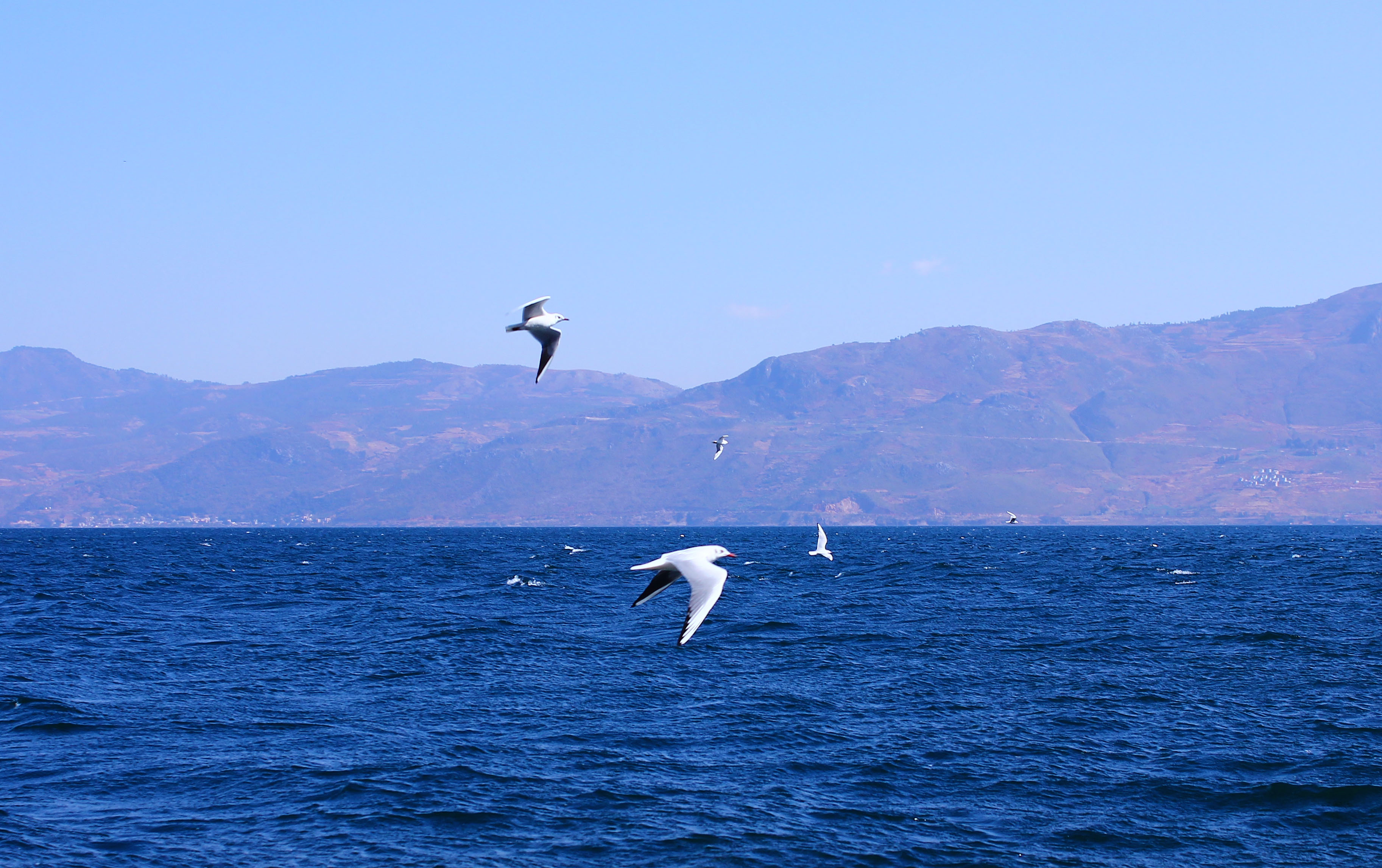 在云南省抚仙湖过冬的红嘴鸥，拍摄于江川县境内。